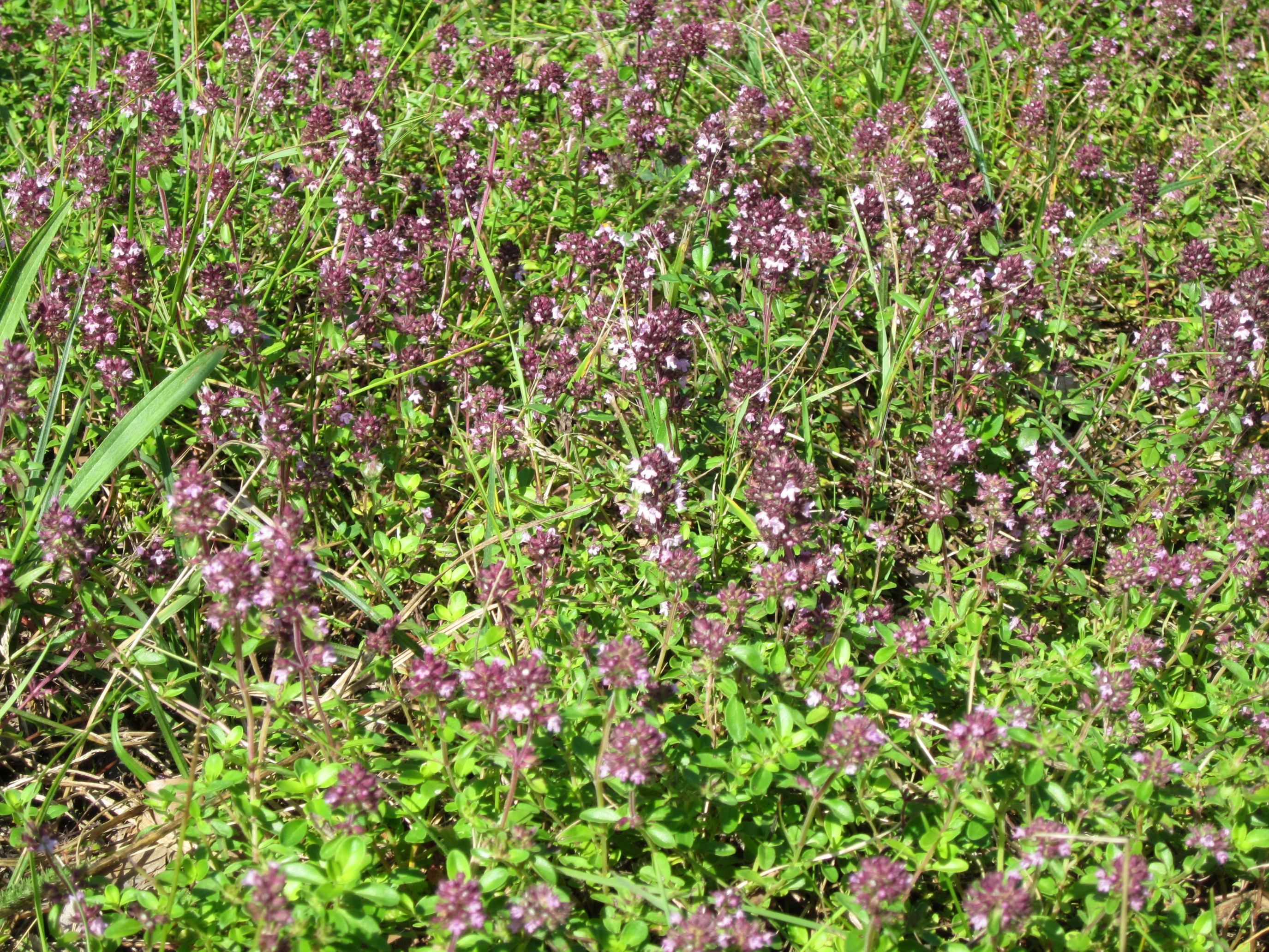 Breitblättriger Thymian (Thymus pulegioides) in der Schwetzinger Hardt